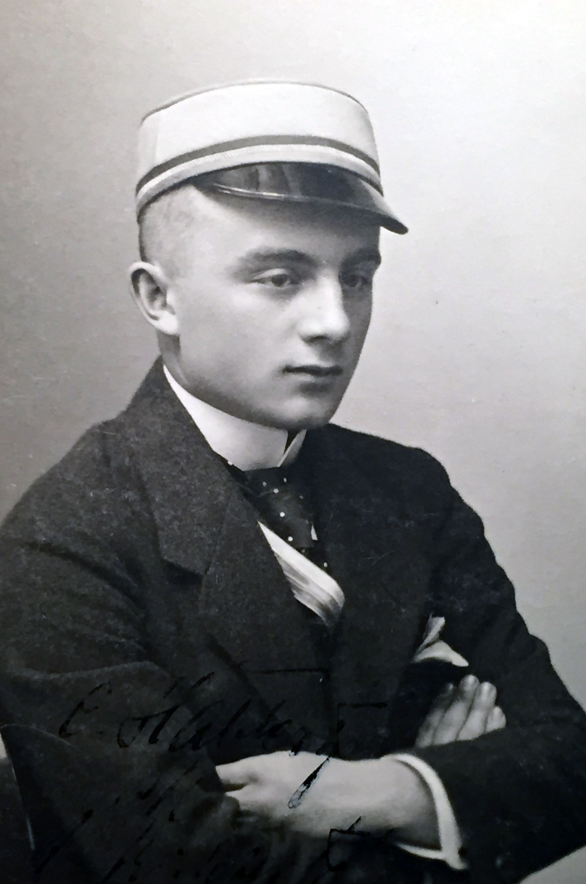 Porträtfotografie von Carl Häbler als Leipziger Corpsstudent